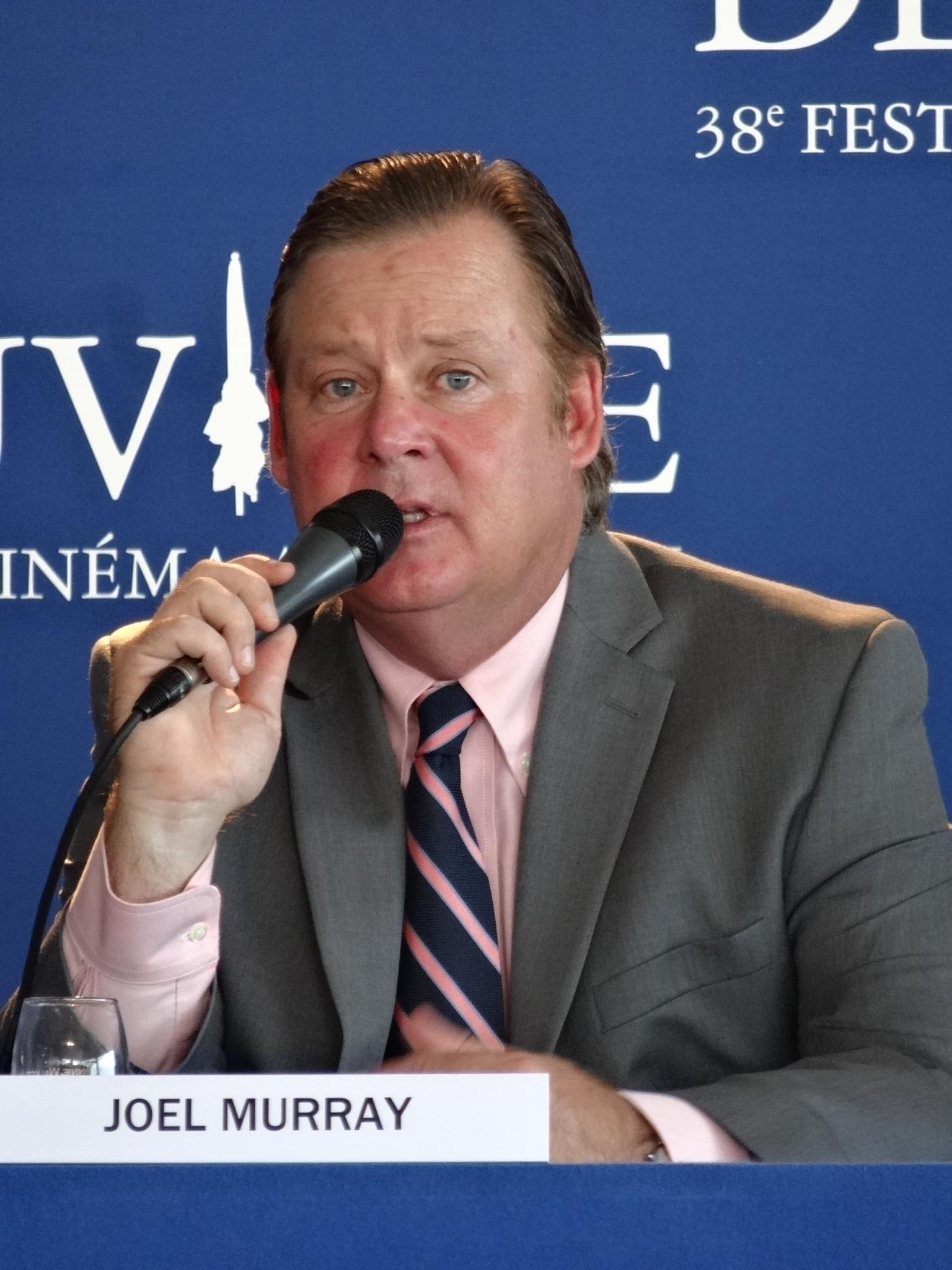 Festival de deauville 2012